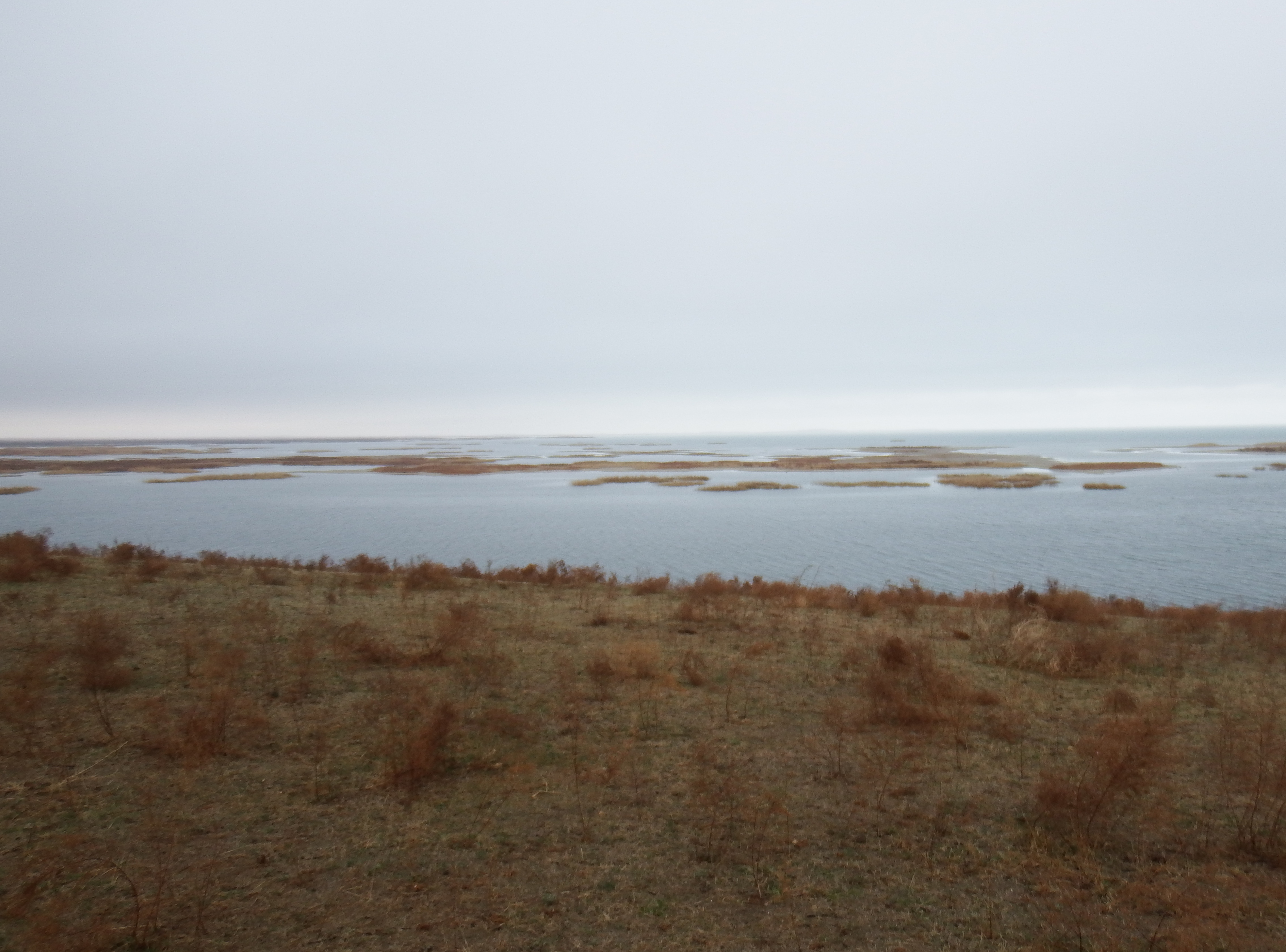 Озеро Тузкан, южный берег (севернее месторождения Учкулач)